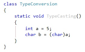 Картинка за конвертиране на типове